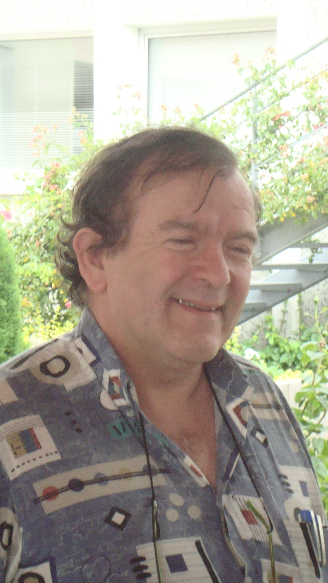 Martial Ménard, miz Gouere 2009, staj KEAV, Kastellin.